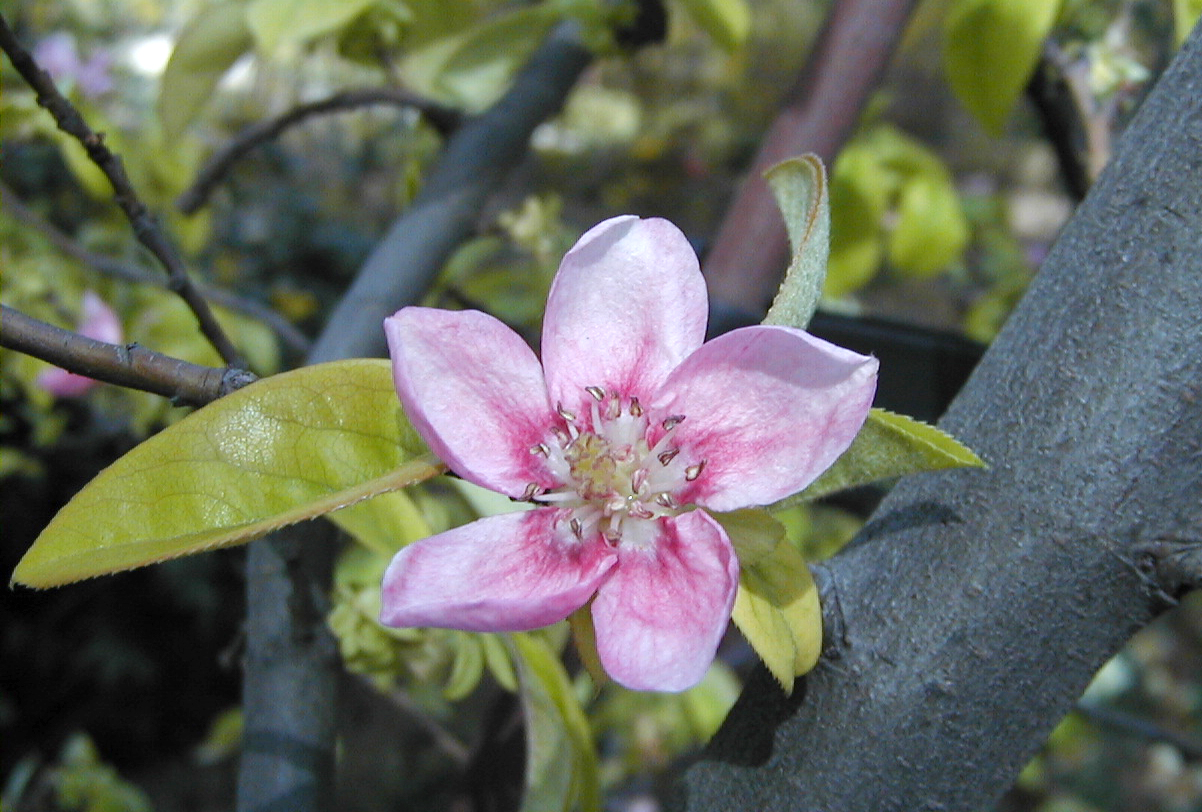 Pseudocydonia sinensis. Real Jardín Botánico, Madrid.